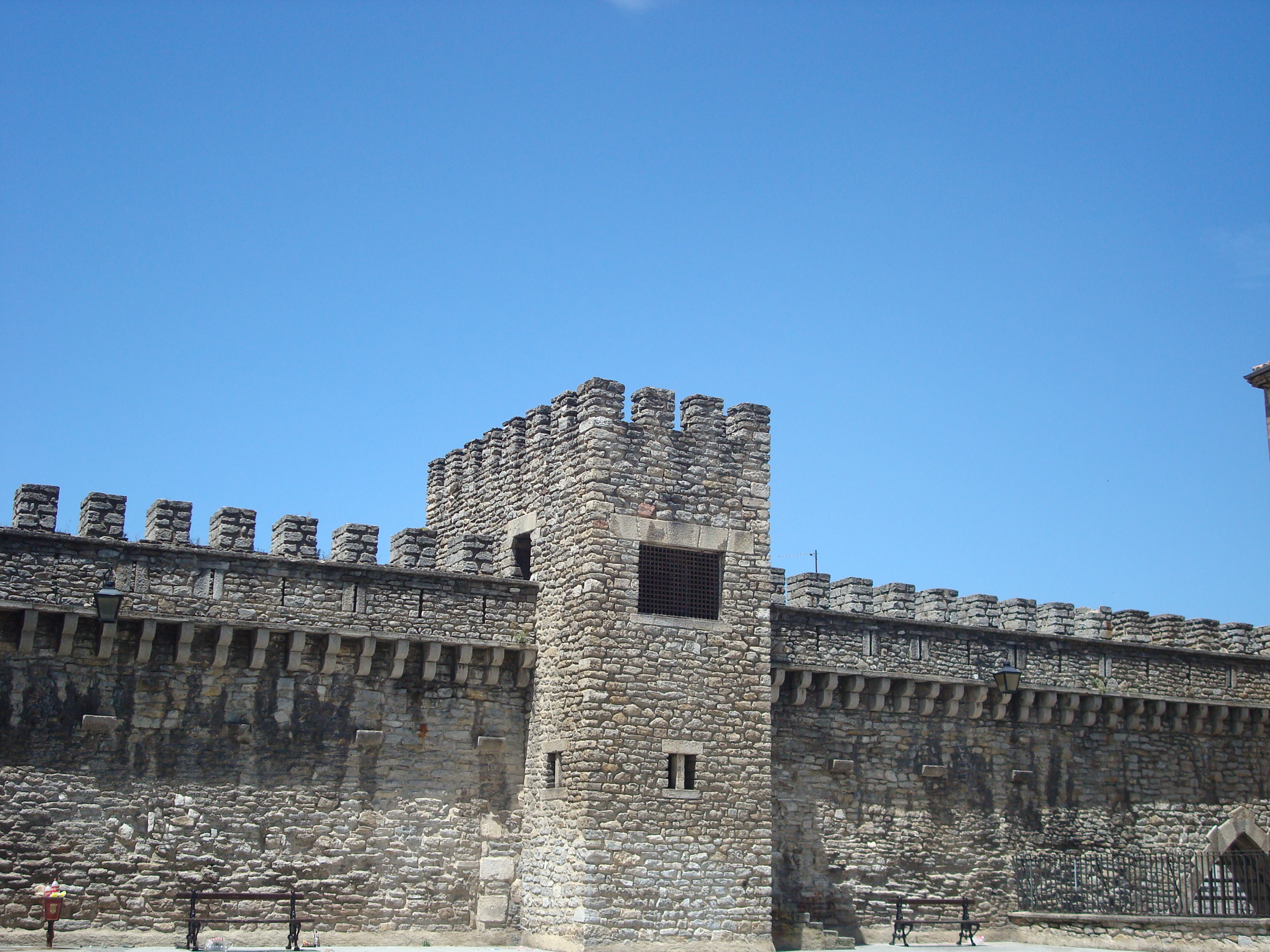 Vitoria - 020